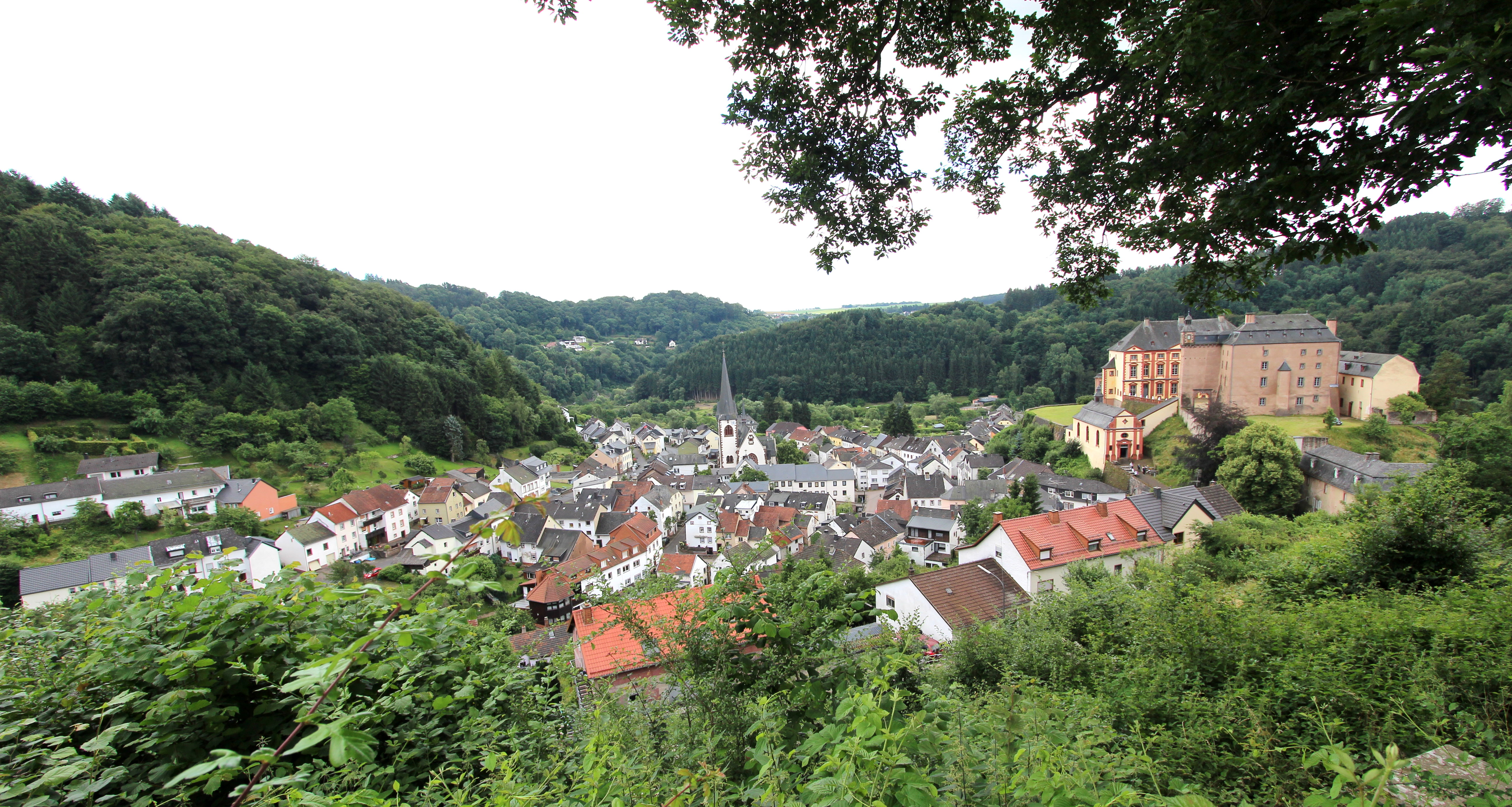 54634 Malberg in der Eifel; Blick aus Nord-Westen von der L34. Aufnahme 2016.